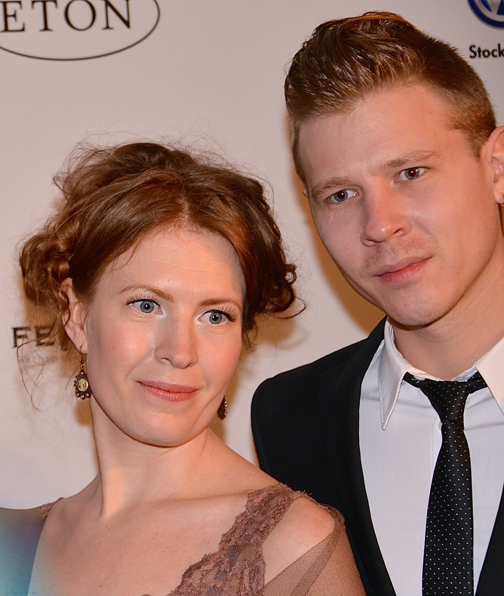 Hanna Lejonqvist och Andreas Jonsson på Guldbaggegalan 21 januari 2013 på Cirkus, Stockholm.